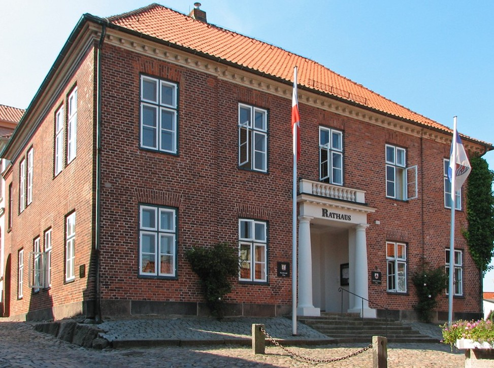 Beschreibung: Plöner Rathaus Fotograf: Darkone, 5. September 2005